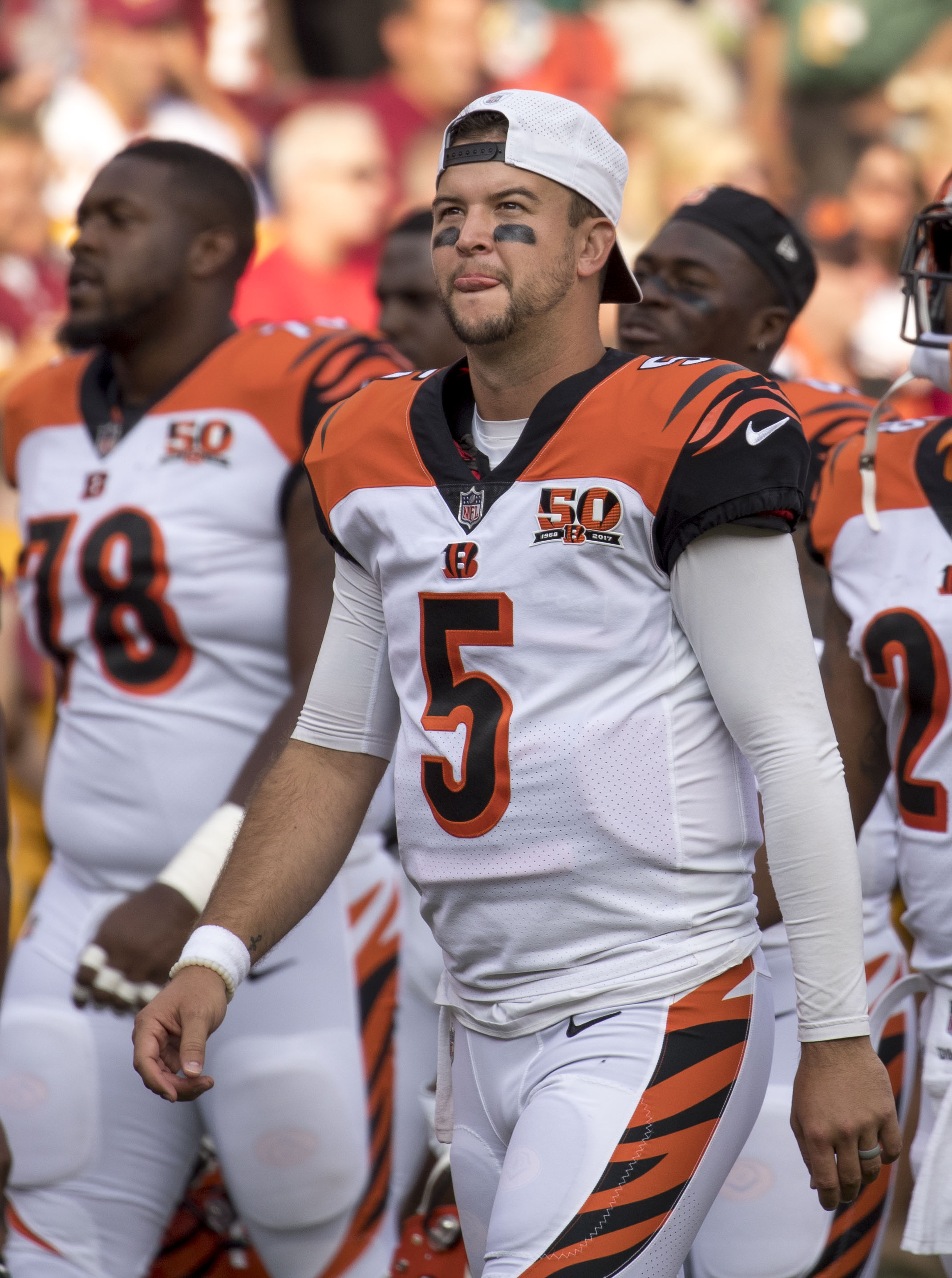 Bengals at Redskins 8/27/17